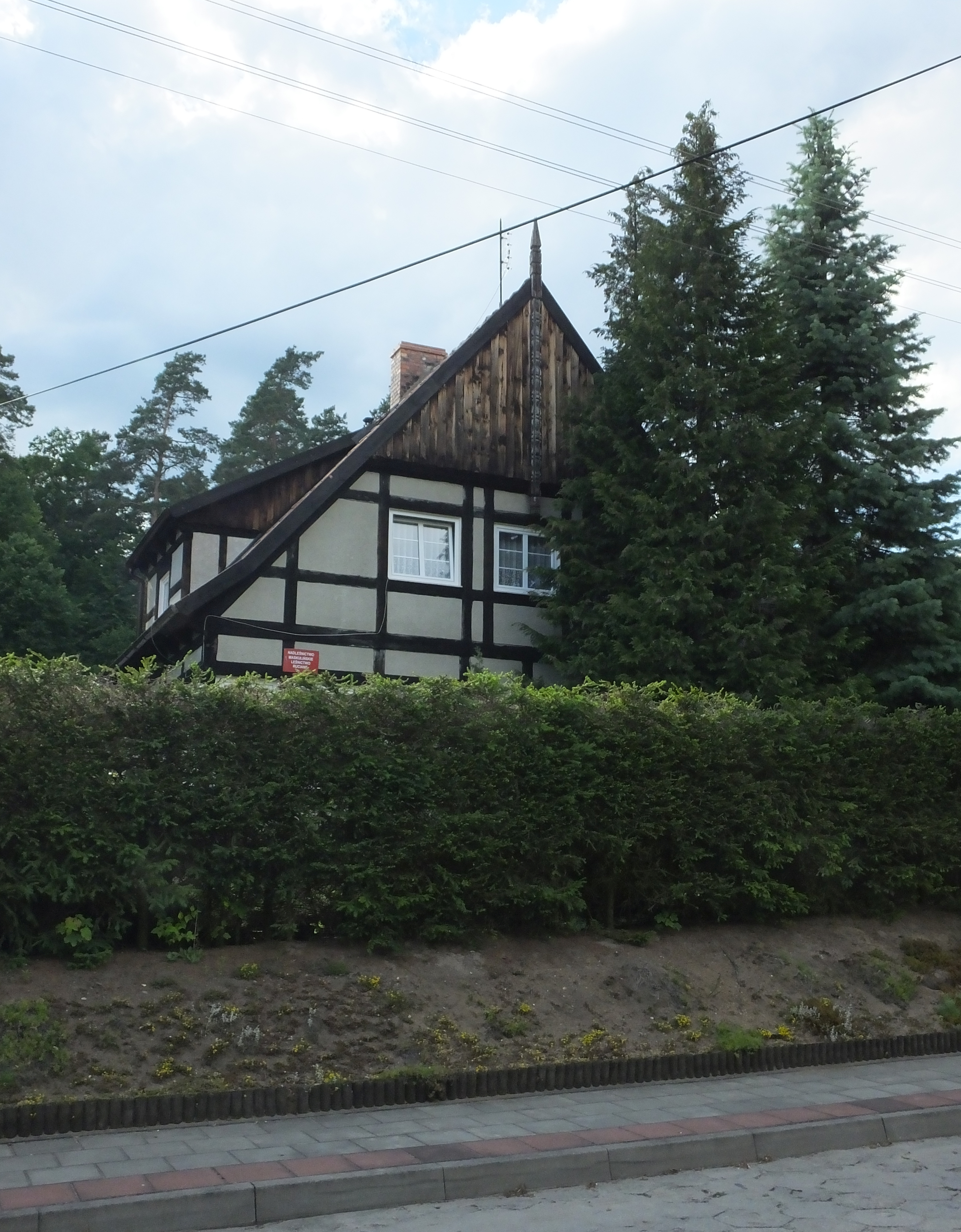 Leśniczówka Ruciane w Rucianem-Nidzie przy ul. Słowiańskiej 16